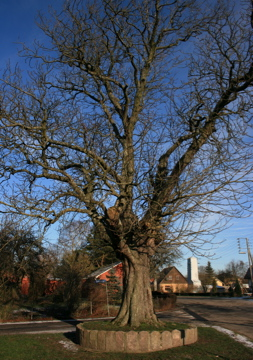 Bytræ i landsbyen Nagelsti på Lolland